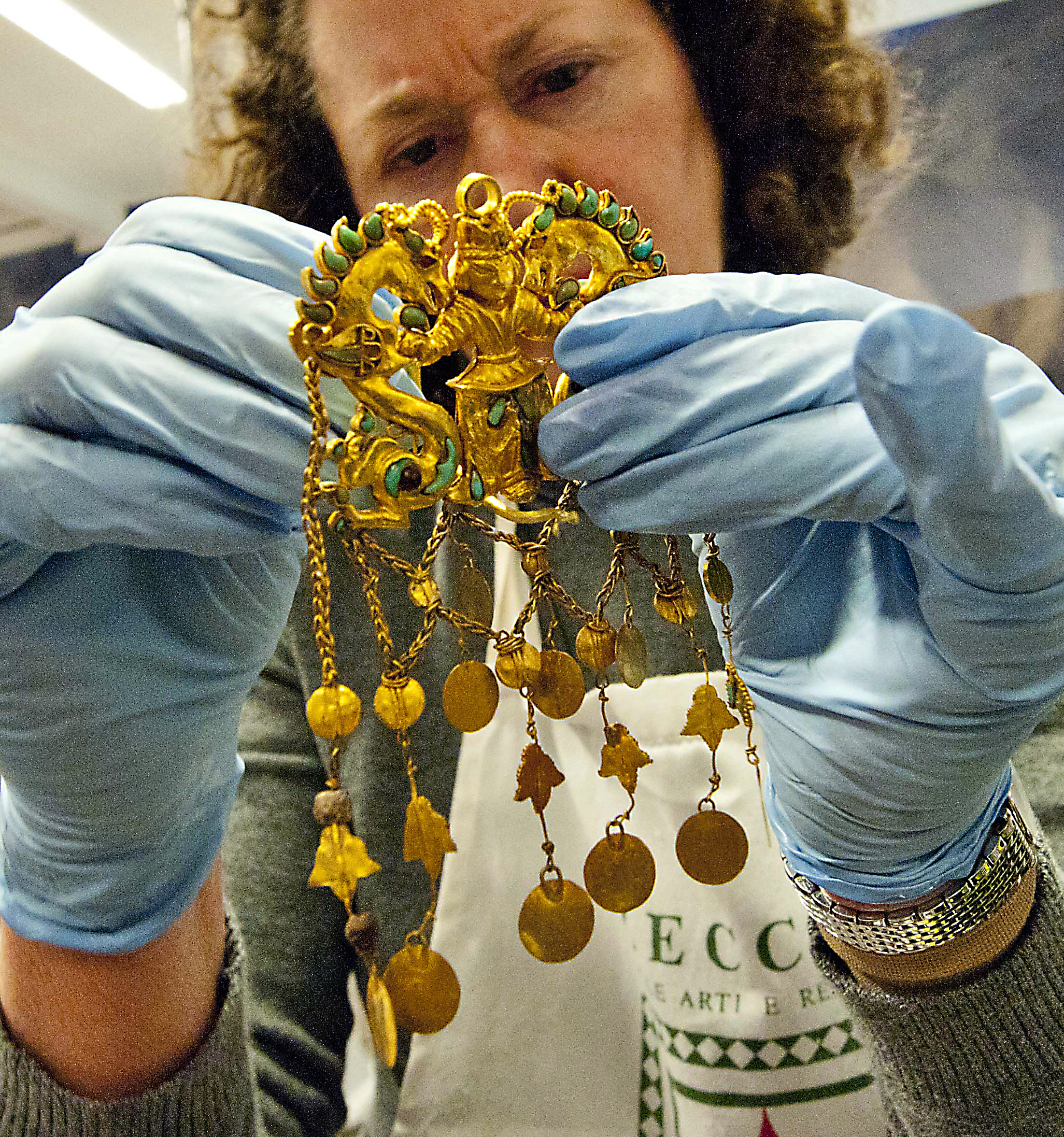 un élément du trésor de Tillia tepe